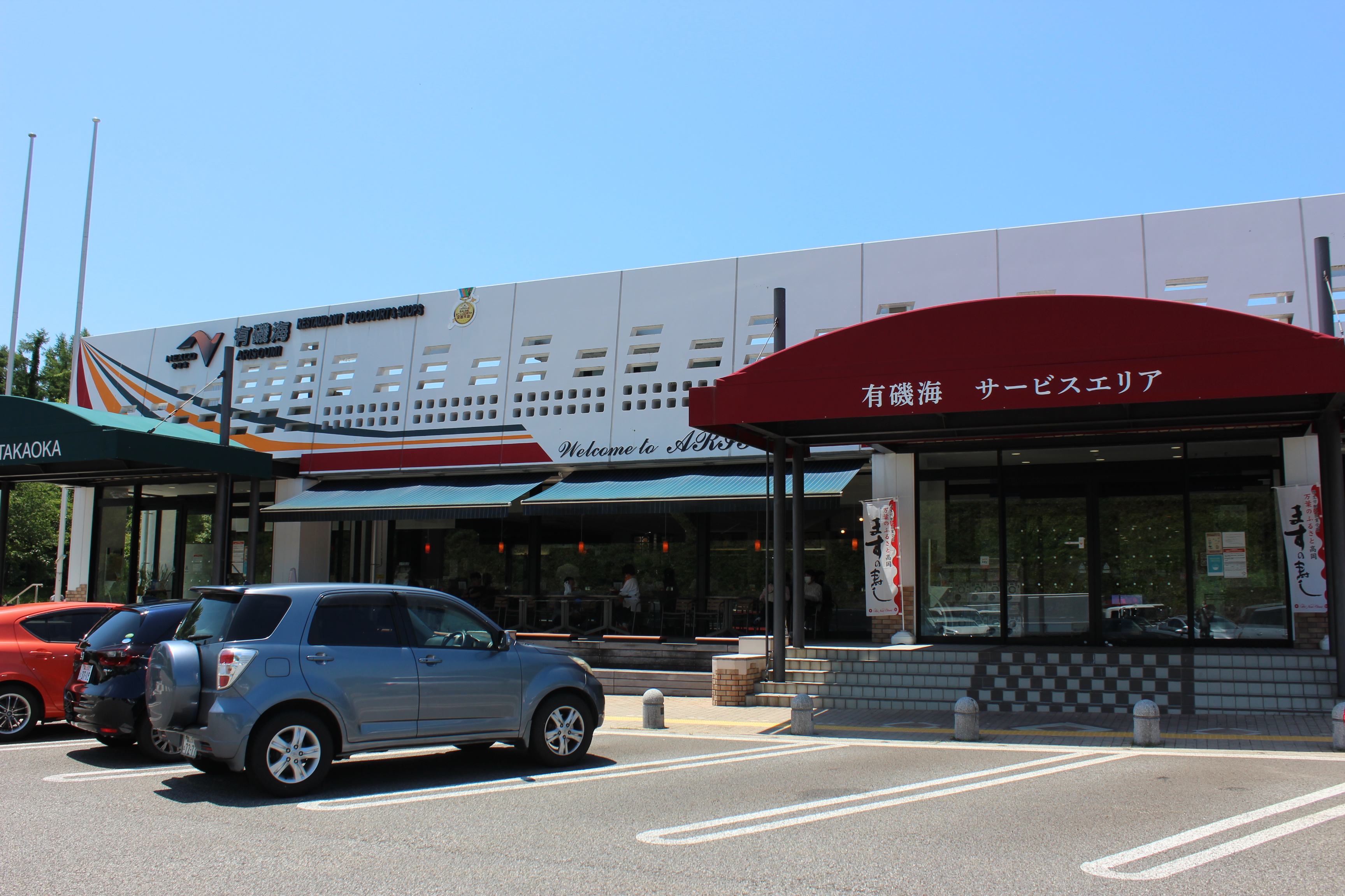 有磯海サービスエリア（下り・新潟方面） Canon EOS Kiss X5